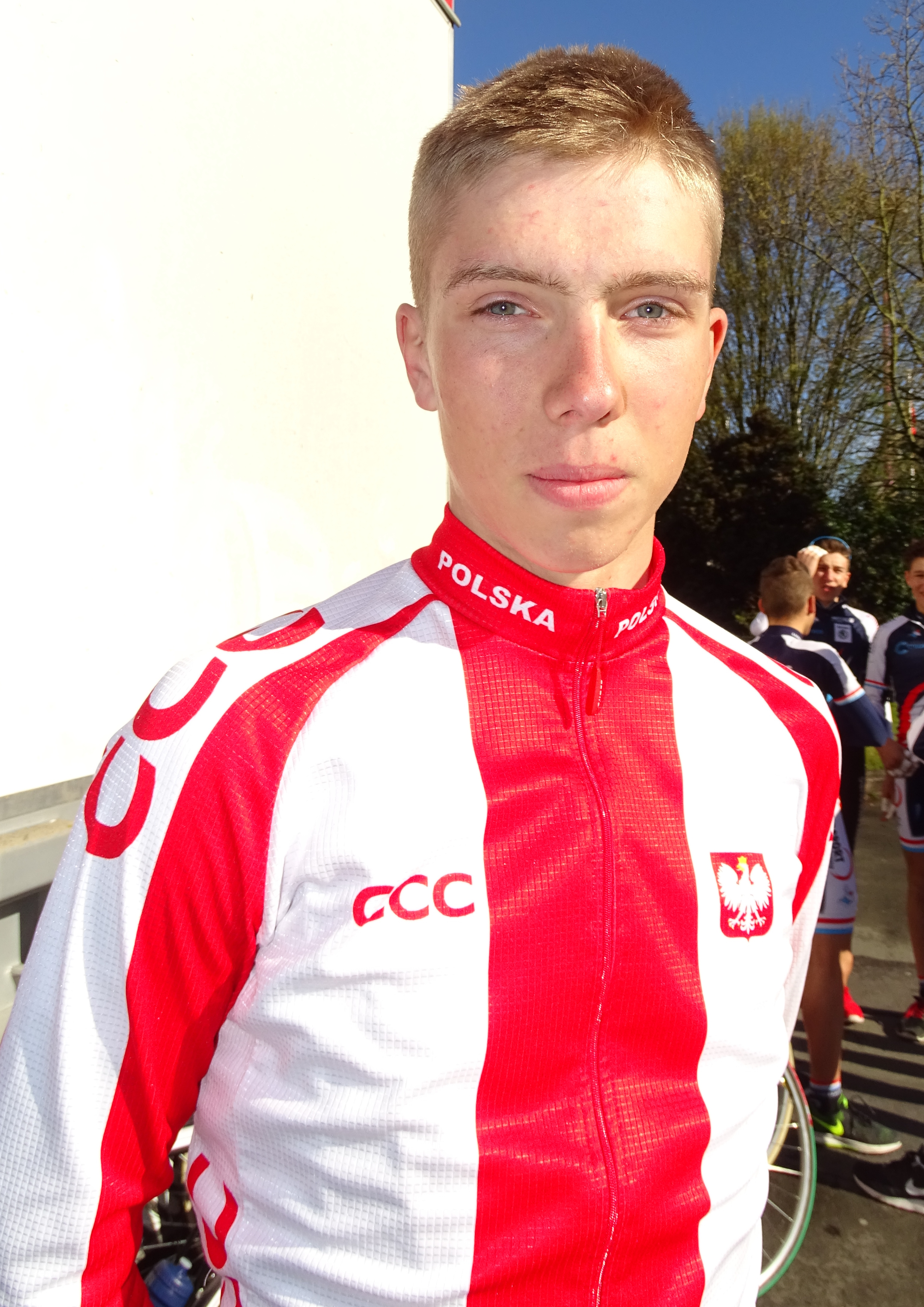 Reportage réalisé le dimanche 10 avril à l'occasion du départ du Paris-Roubaix juniors 2016 à Saint-Amand-les-Eaux, France.